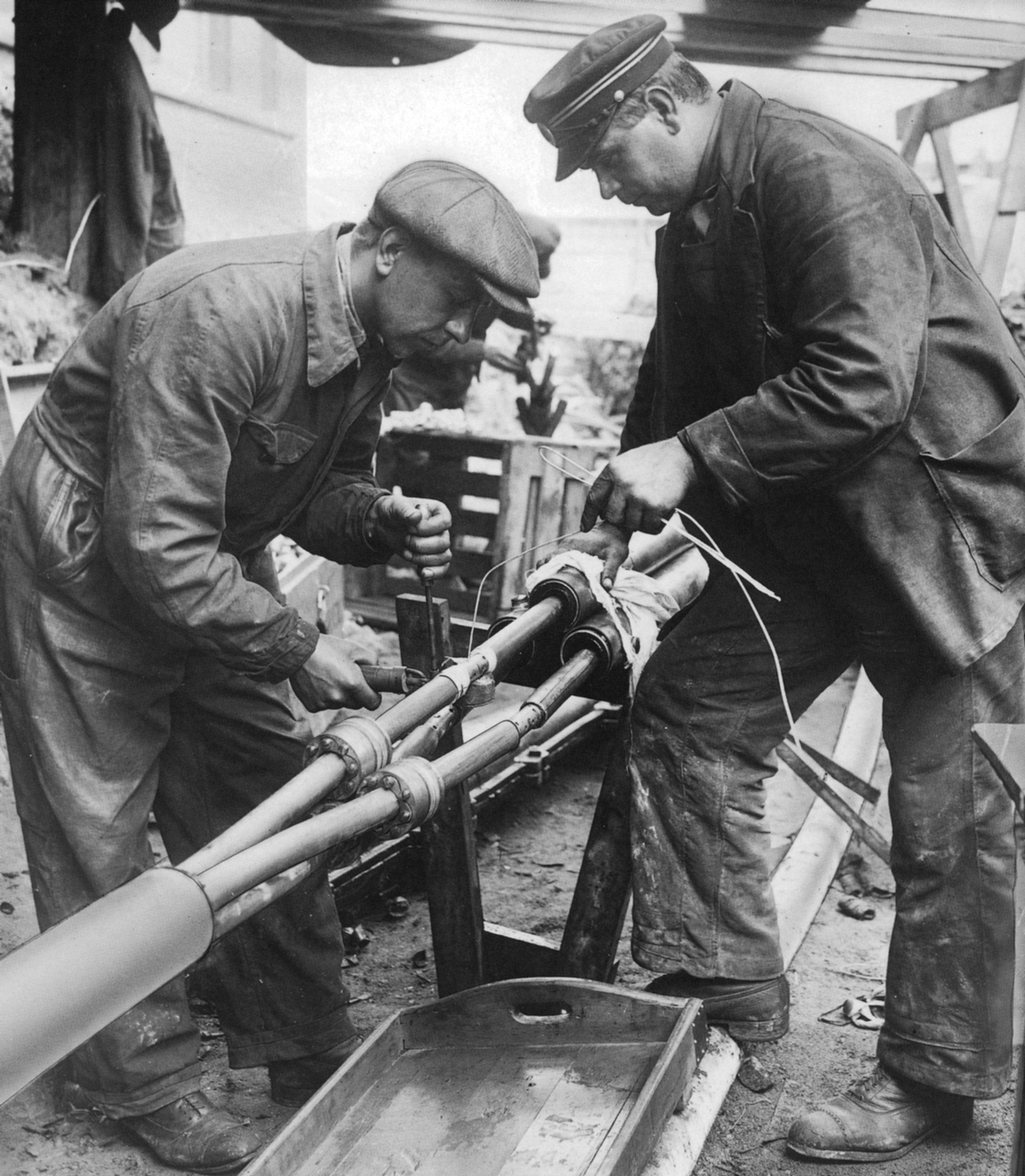 Stockholm 1931, Televerkets montörer skarvar en telekabel